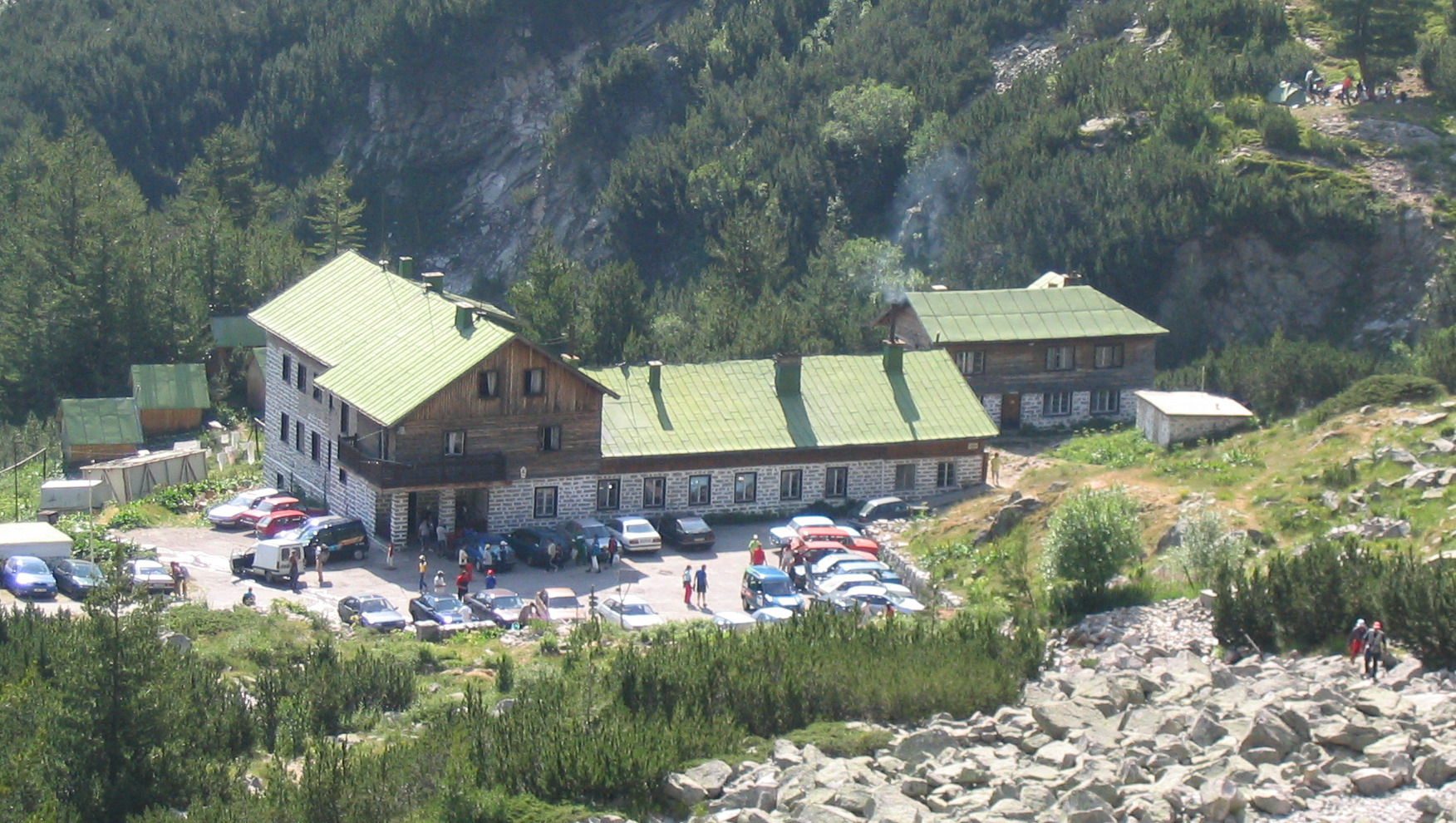 "Vihren" hut, Bulgaria